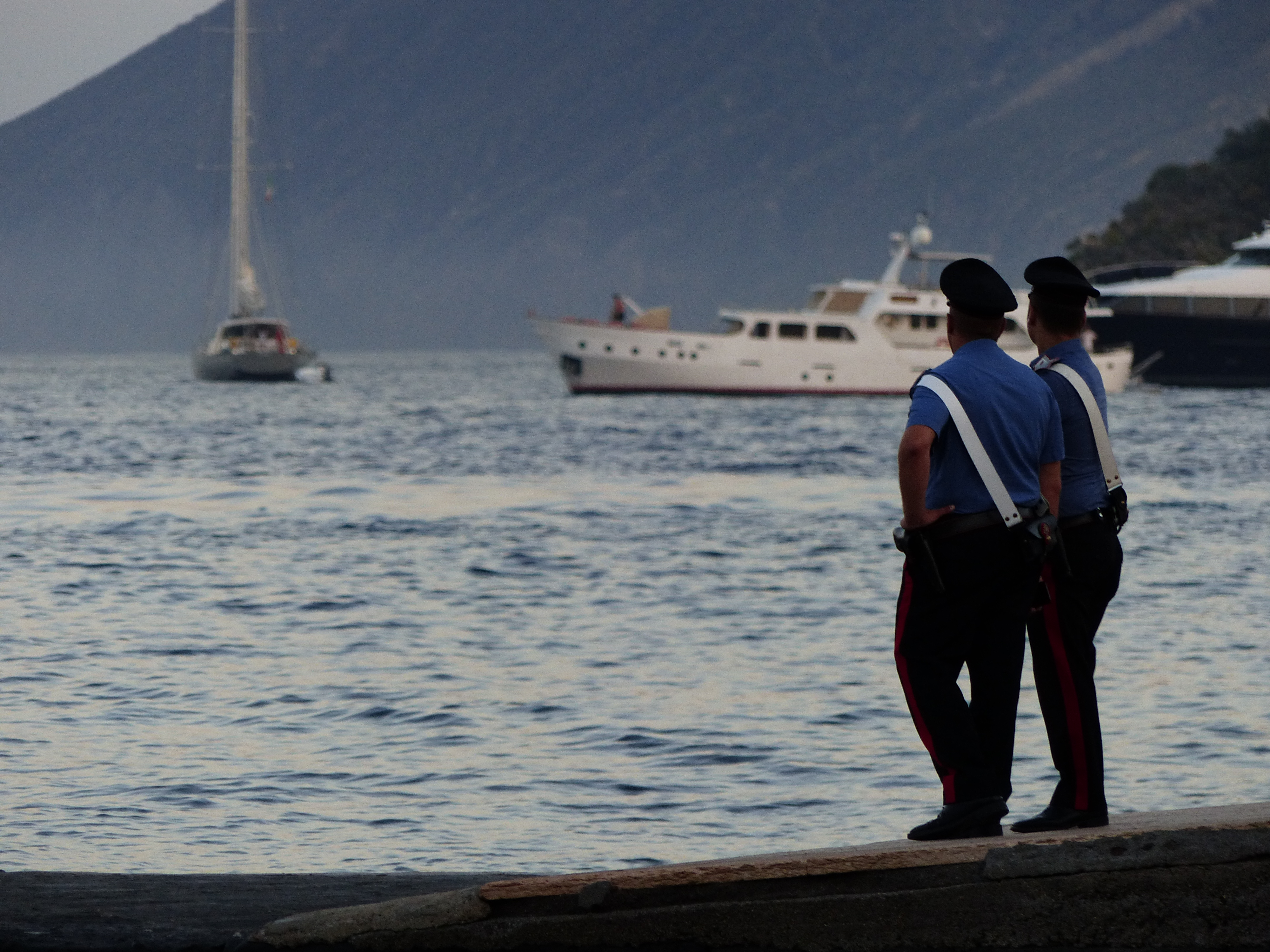 Carabineros, Lipari, Islas Eolias.